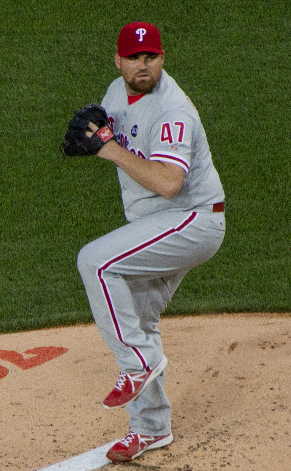 Sean O'Sullivan